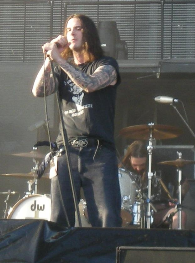 Phil Anselmo al concerto dei Down, a Bologna il 22 luglio 2008, in veste di supporter dei Metallica.